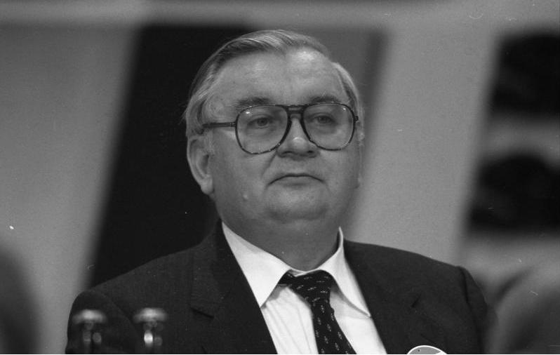 2.-5.11.1981 30. Bundesparteitag der CDU in Hamburg im Congress Centrum